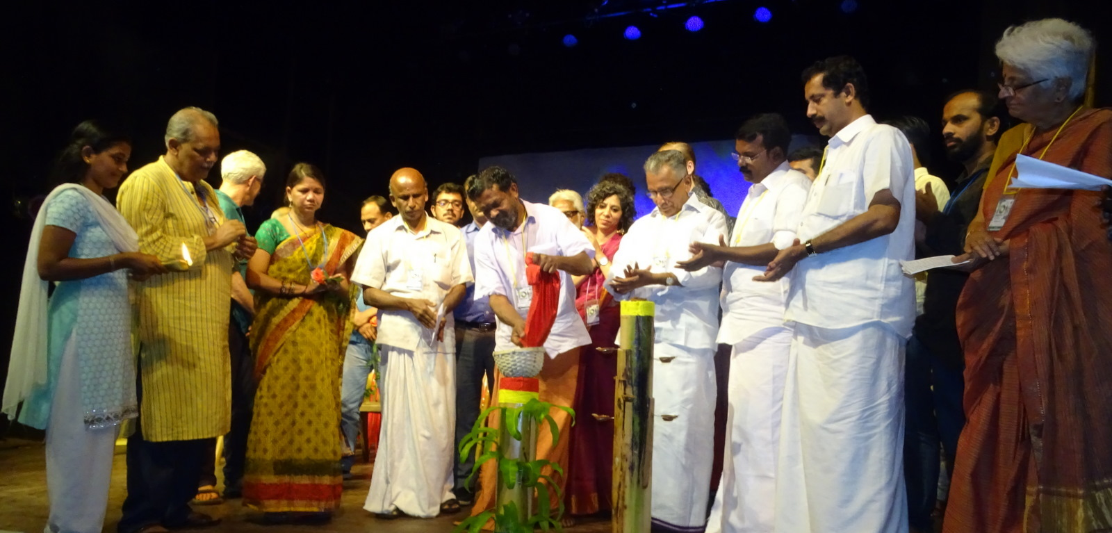 പത്താമത് വിബ്ജിയോര്‍ രാജ്യാന്തര ചലച്ചിത്രോത്സവം,വയനാട്ടിലെ ആദിവാസികര്‍ഷകനായ ചെറുവയല്‍ രാമന്‍, തവളക്കണ്ണന്‍ നെല്‍വിത്ത് വല്ലത്തിലേയ്ക്ക് നിറച്ചുകൊണ്ട് ഉത്ഘാടനം ചെയ്യുന്നു.